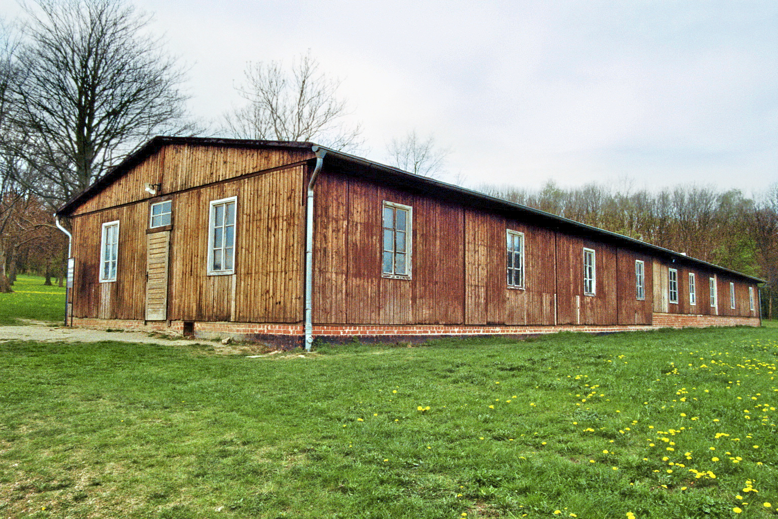 KZ Buchenwald: Die letzte erhaltene Funktionsbaracke. Sie wurde nach dem endgültigen Abbruch der meisten Lagerbauten zu Beginn der 1950er Jahre demontiert und fand bis 1993 in einer thüringischen Kleinstadt Verwendung. Seit 1994 ist sie wieder in Buchenwald.